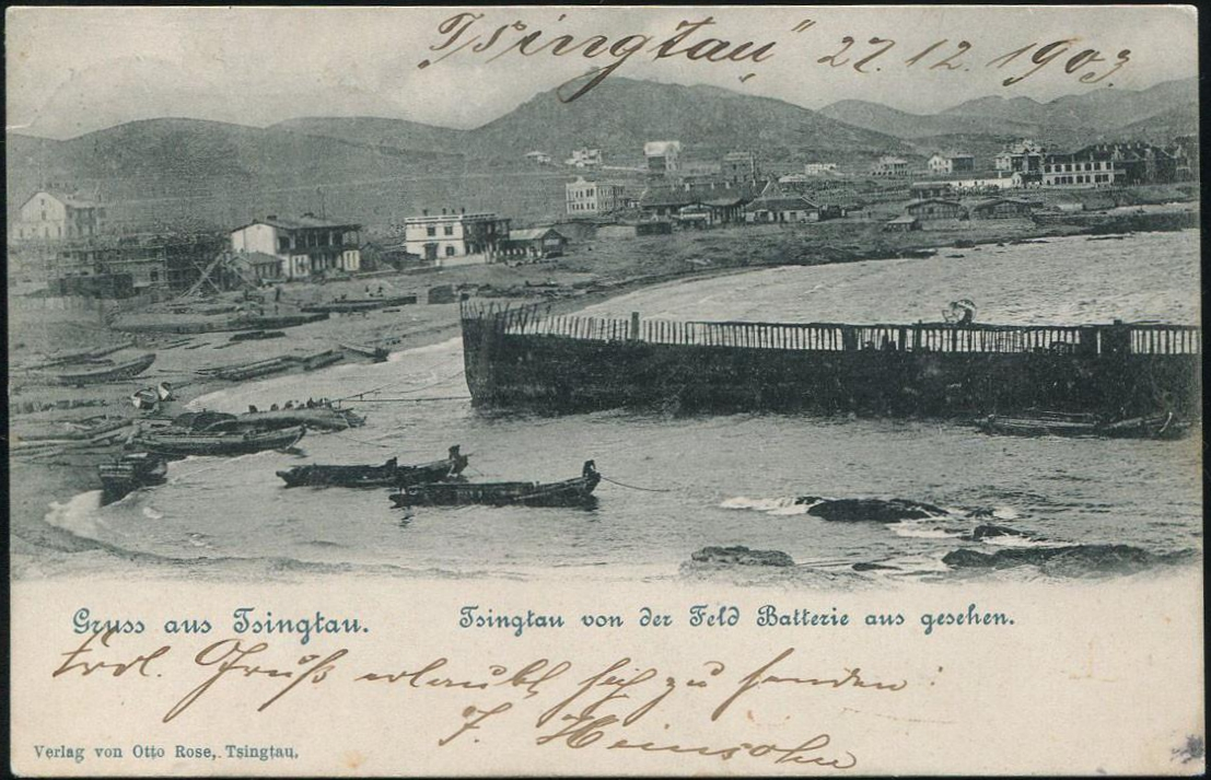 青岛德租时期太平路西段街景